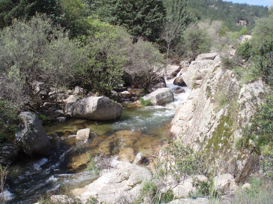 Río Manzanares a su paso por La Pedriza (Comunidad de Madrid, España).